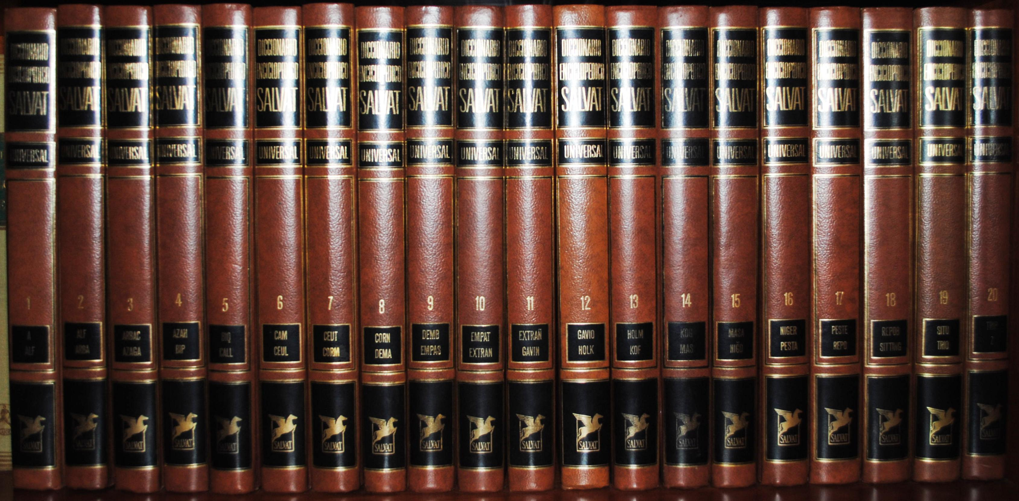 Vexa o título e as categorías.